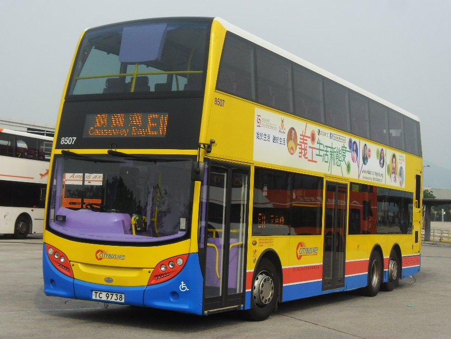 中文（香港）: 城巴E11線，在機場博覽館總站準備出發